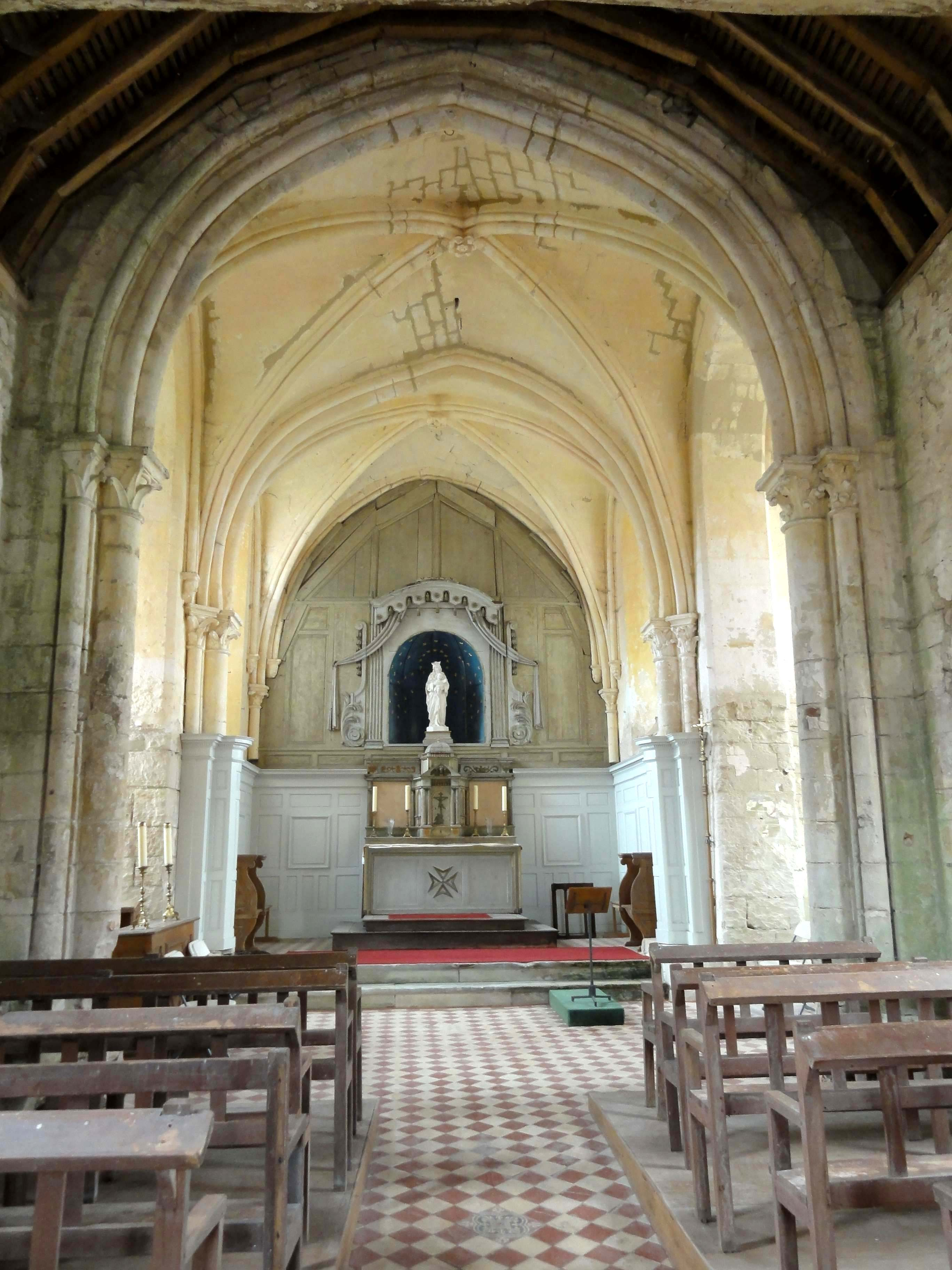 Voir titre.